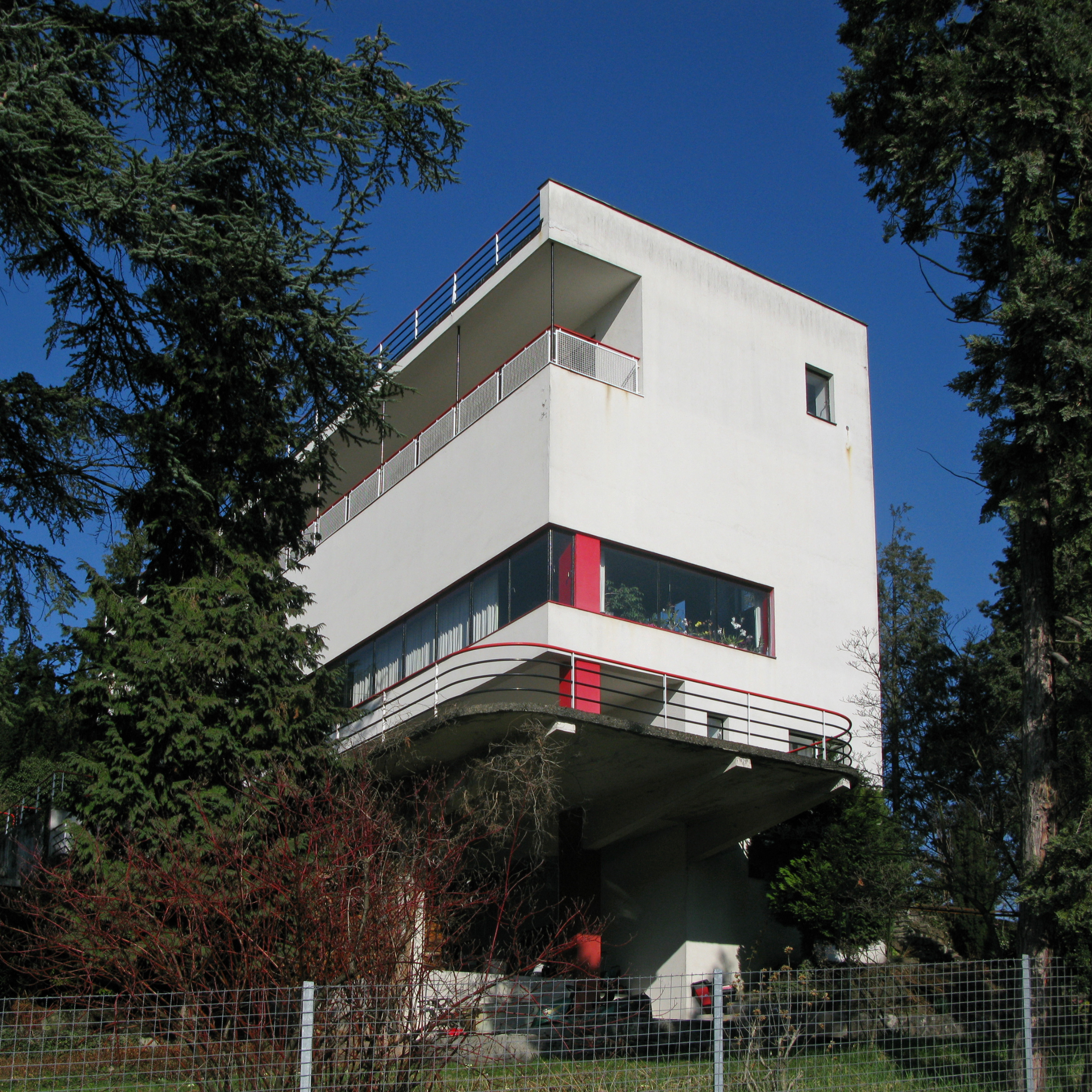 Villa Kenwin, La Tour-de-Peilz. Maître de l'ouvrage: Kenneth Macpherson et Winifred Ellerman (Bryher) Architectes: Hermann Henselmann, Alexander Ferenczy (1930-1931)